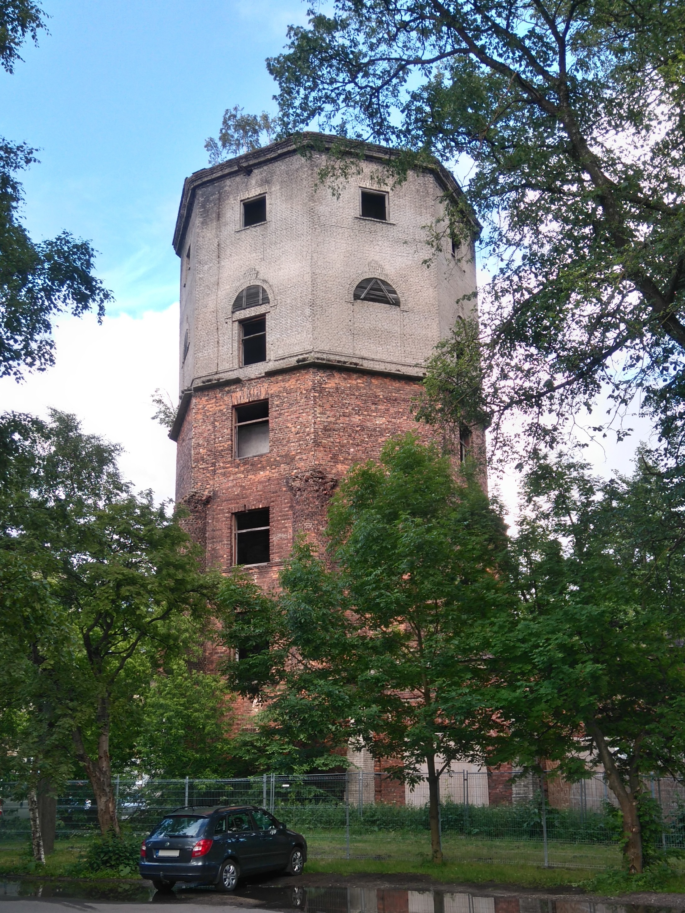 Arsenali veetorn, Erika tänav 4a.